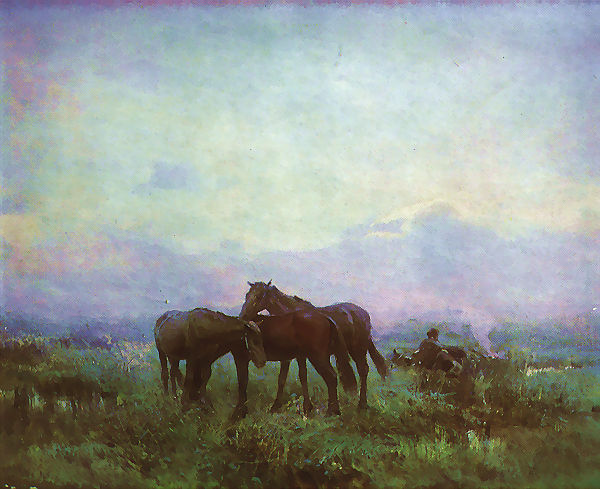 Serhii Vasylkivsky "Kozachyi picket" Wood and oil. 1888 p. 32.5 x 39.5 cm